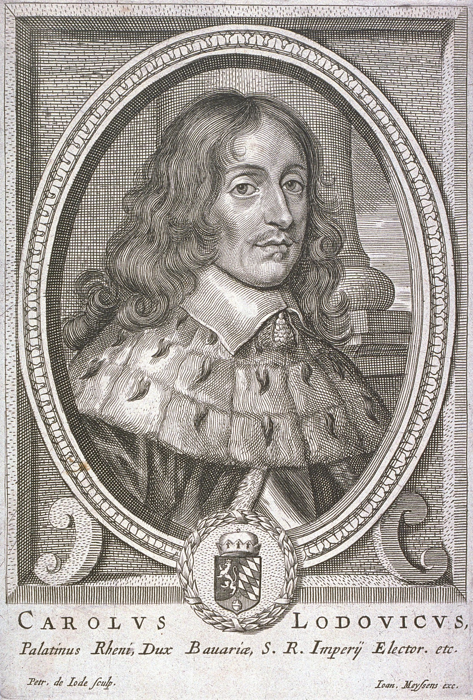 Karl I. Ludwig, Kürfürst von der Pfalz